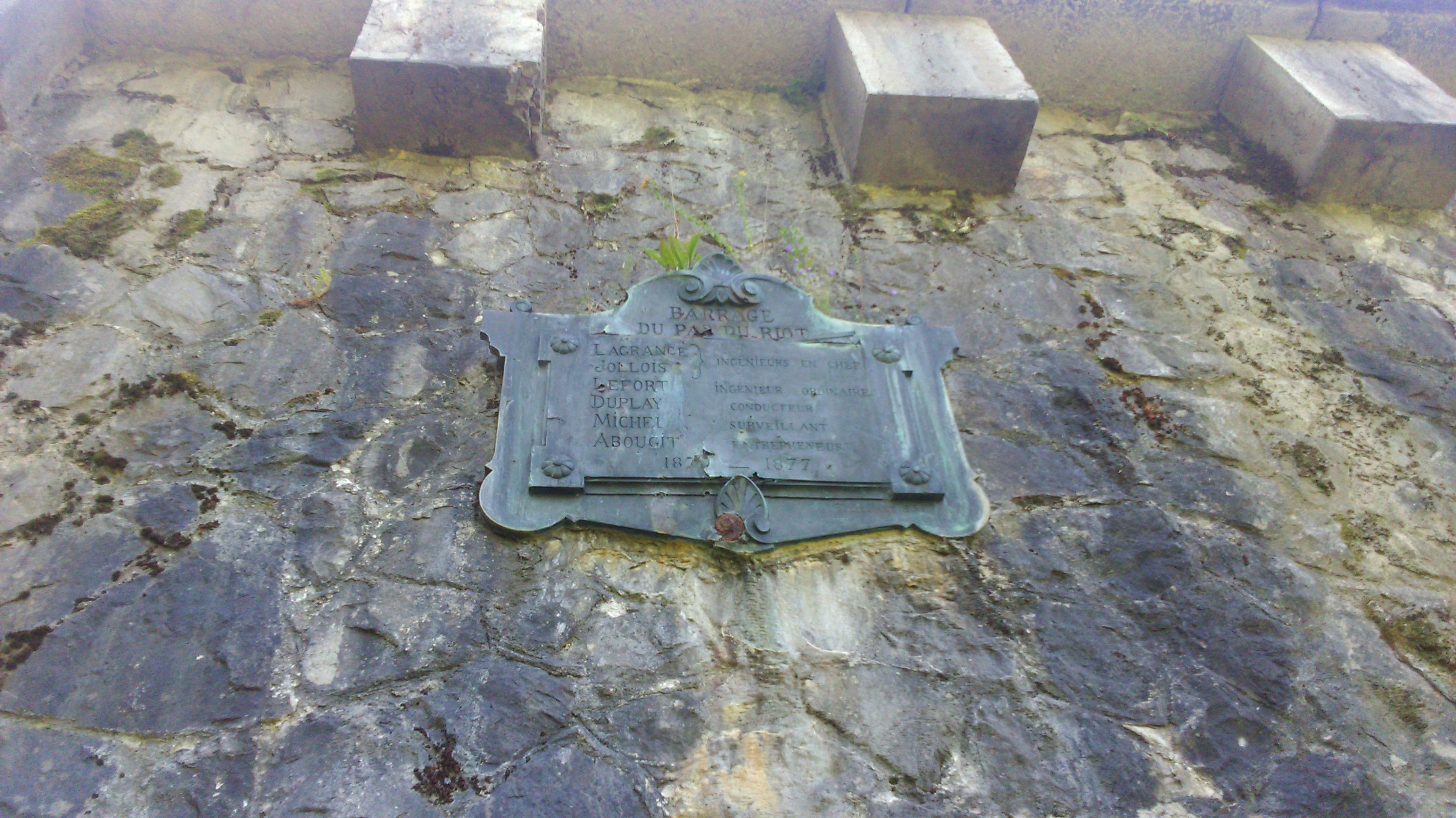 On peut lire sur la plaque : "Barrage du Pas-du-Riot LAGRANGE, JOLLOIS ingénieurs en chef LEFORT ingénieur ordinaire DUPLAY conducteur MICHEL surveillant ABOUGIT entrepreneur 1873-1877"